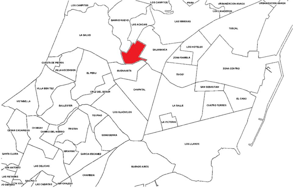 Localización del barrio.